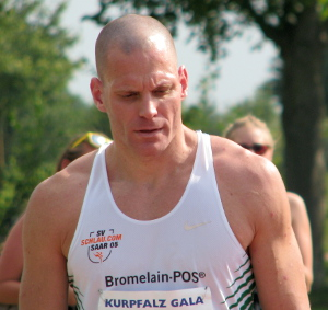 Simon Kirch beim DLV-Olympia-Testwettkampf 2012 im Sepp-Herberger-Stadion Weinheim.